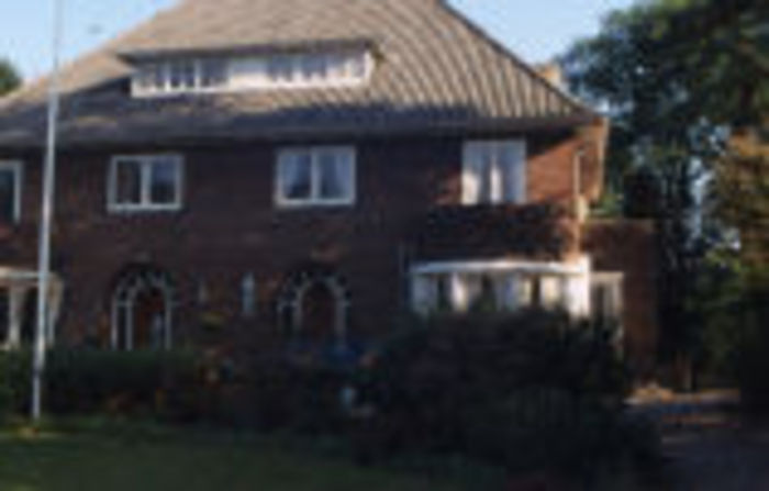 Dubbele Villa Kerkewijk 147-145